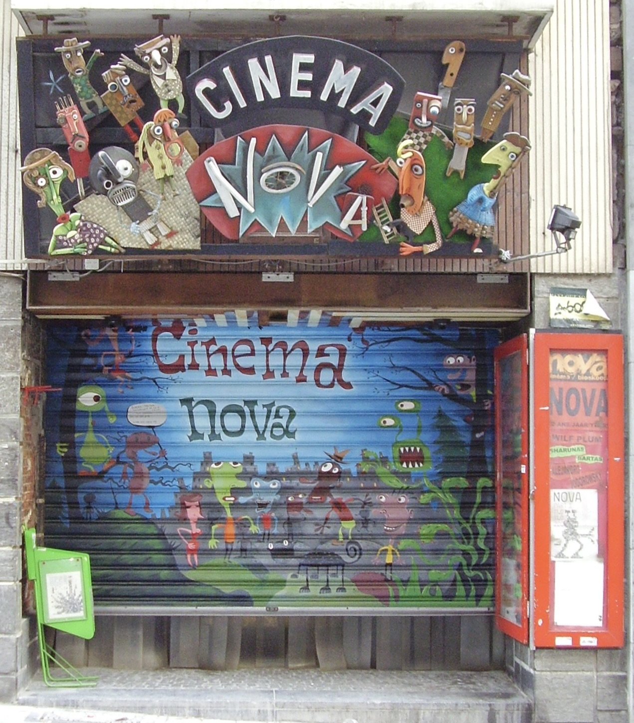 Cinéma Nova, Bruxelles - Belgique